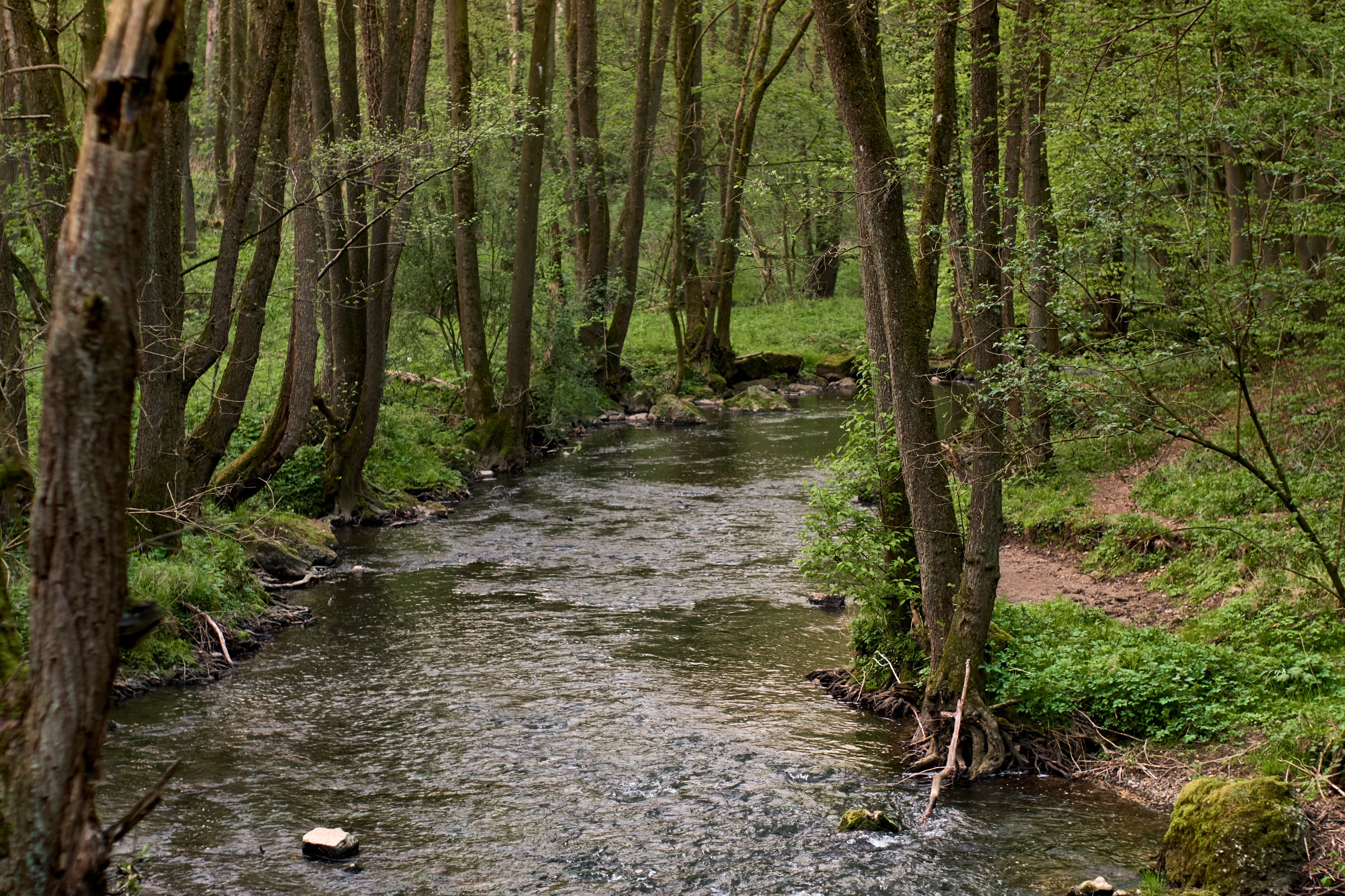 Der Lauf der Inde, im Bereich des Naturschutzgebietes Gedau. Im lokalen Volksmund Stolbergs wird die Inde in diesem Bereich auch gerne Münsterbach genannt.